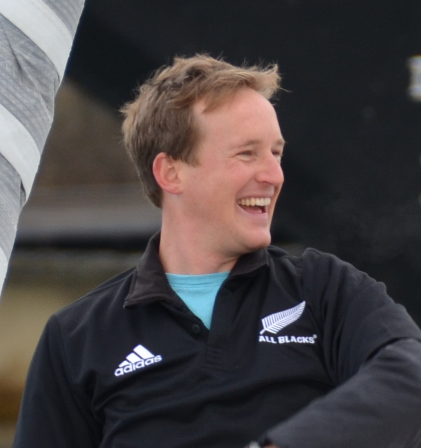 Conrad Colman au départ du Vendée Globe 2016-2017